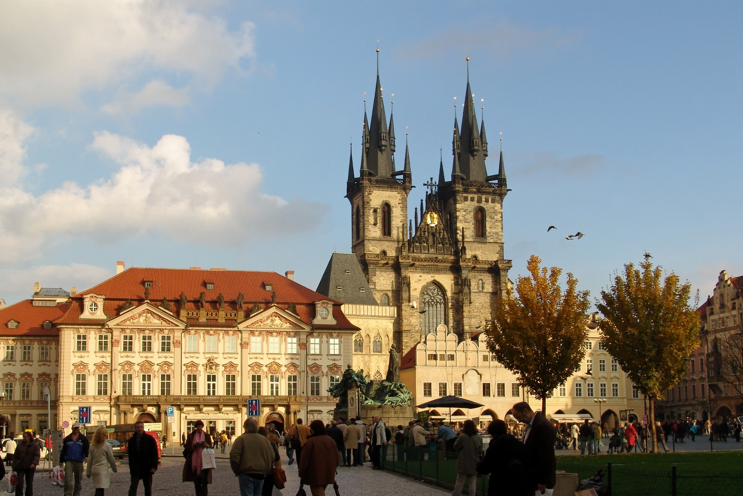 Architecture de Prague .